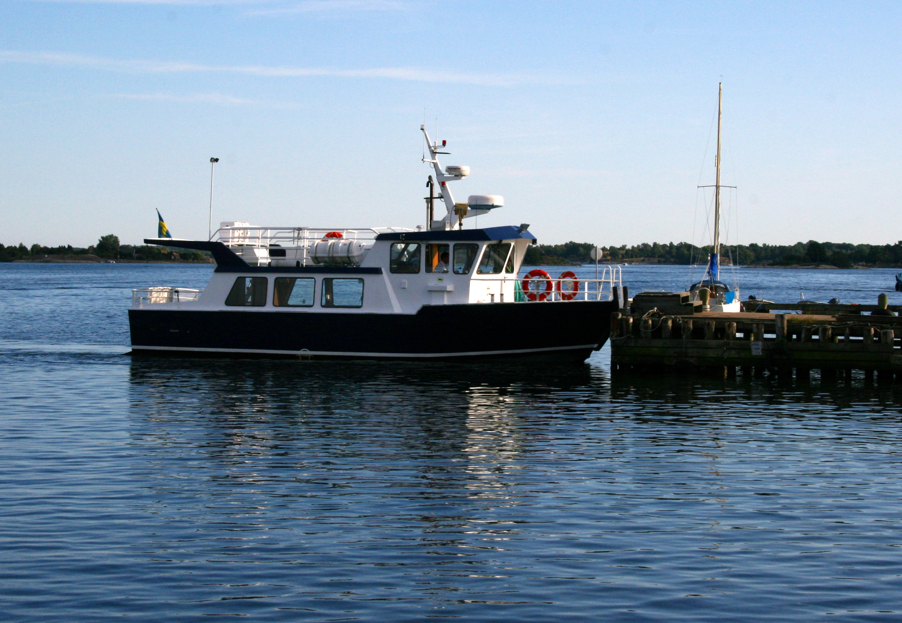 M/F Anemon i Matvik, Blekinges skärgård.